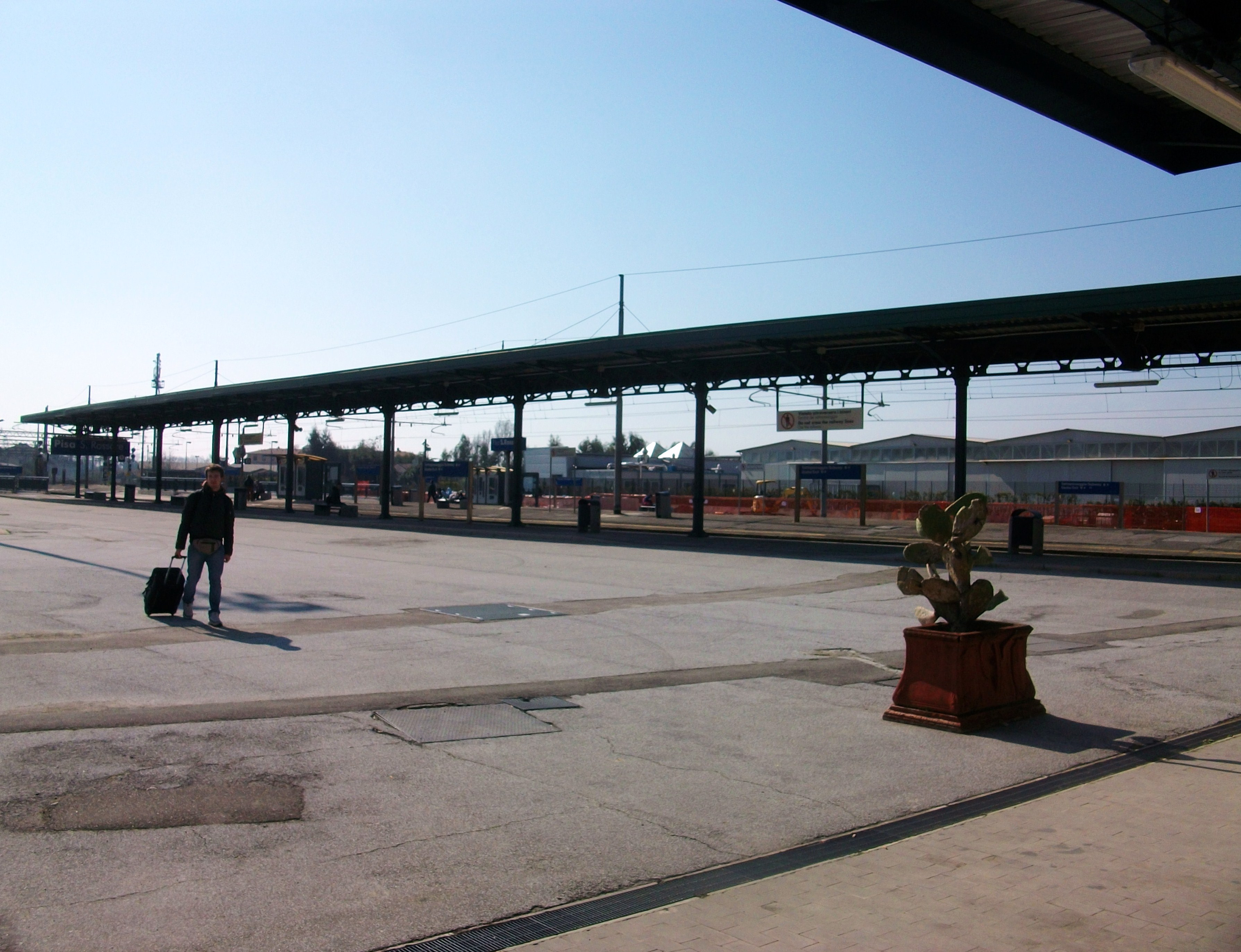 Estació de Pisa - San Rossore.